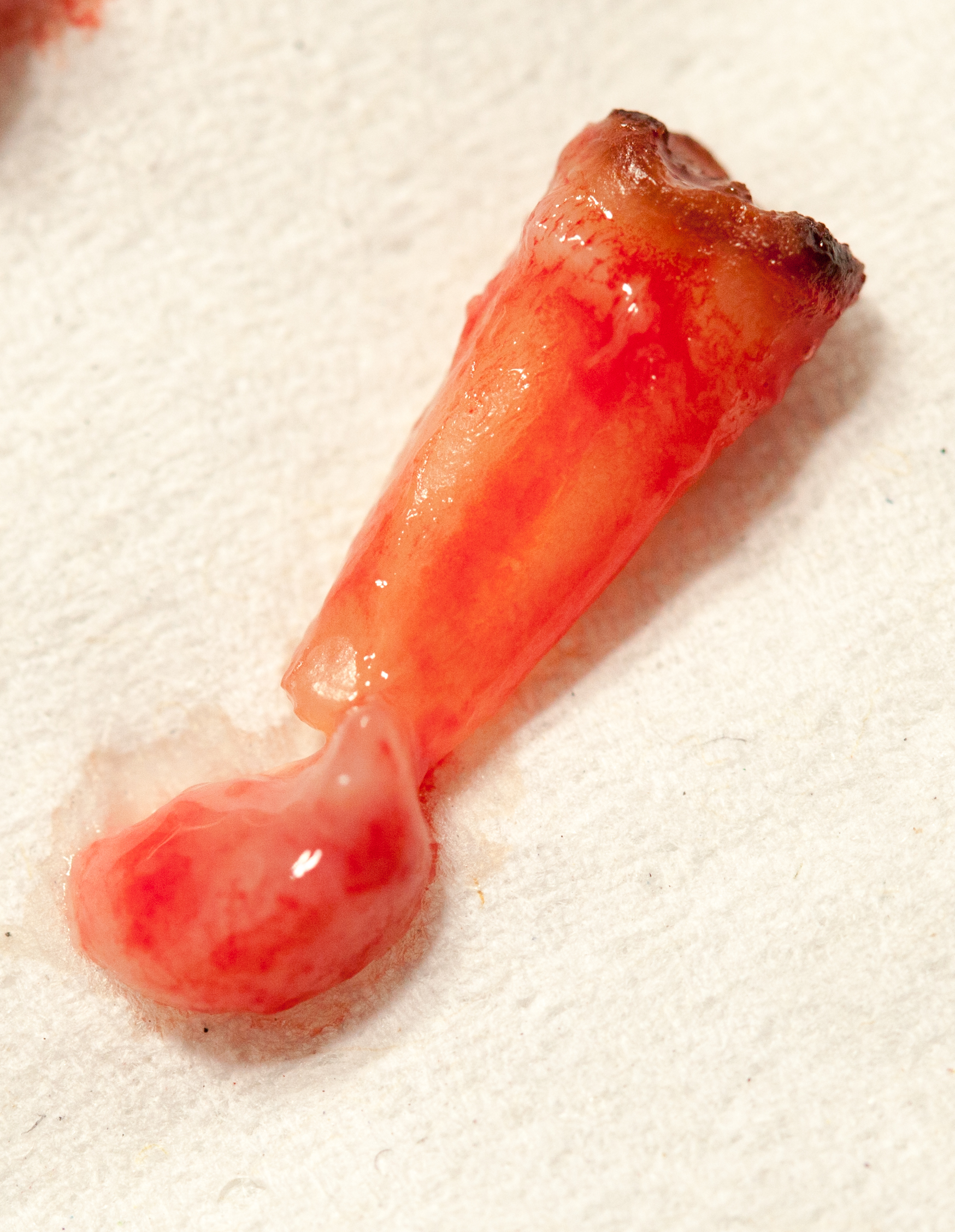 extrahierter Zahn mit apikalem Granulom (vielleicht auch mit apikaler Zyste) - das lässt sich ohne Histologie nicht genau sagen